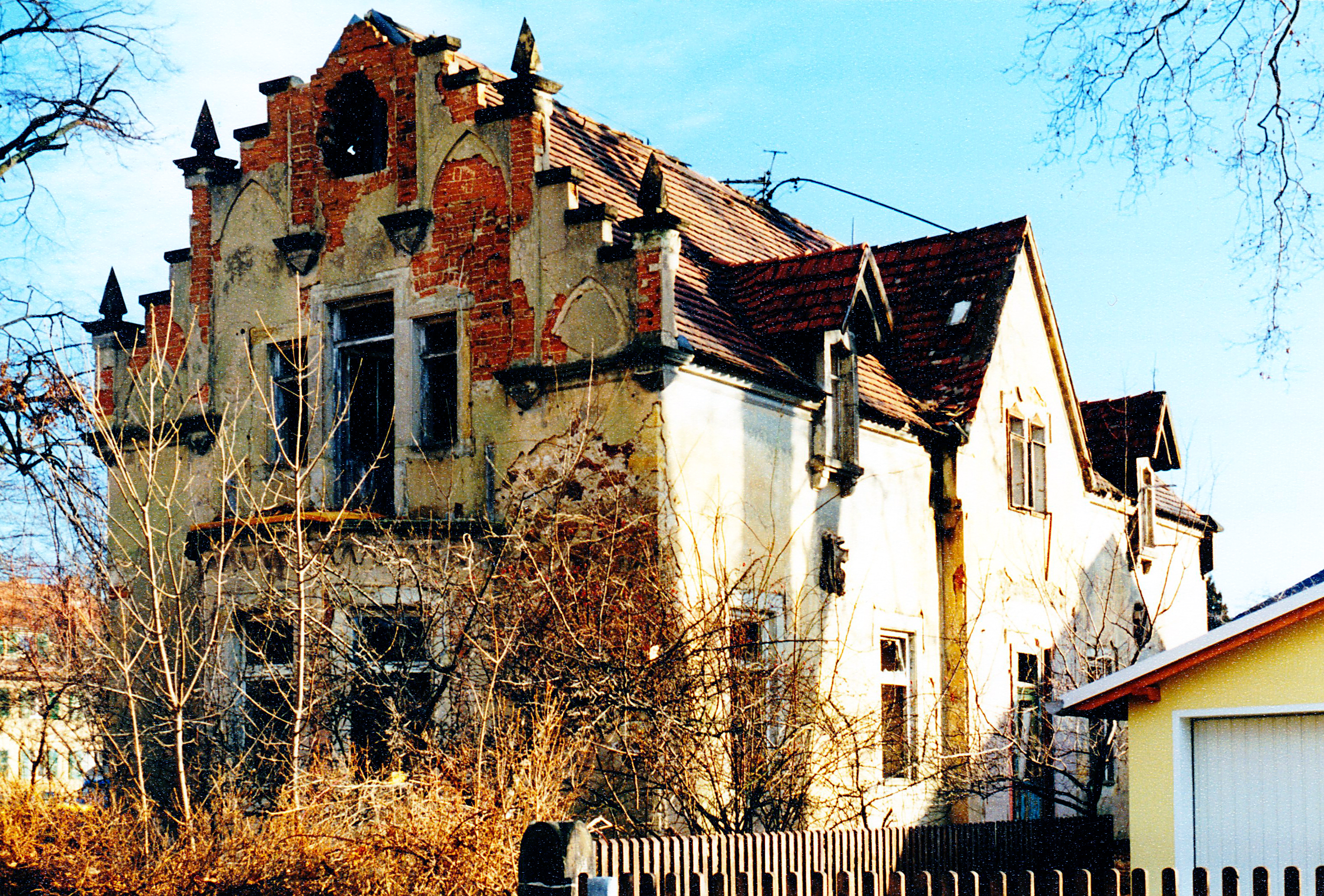 Radebeul-Niederlößnitz, Zillerstraße (Radebeul), Foto 1999. Südseite des Gotischen Hauses